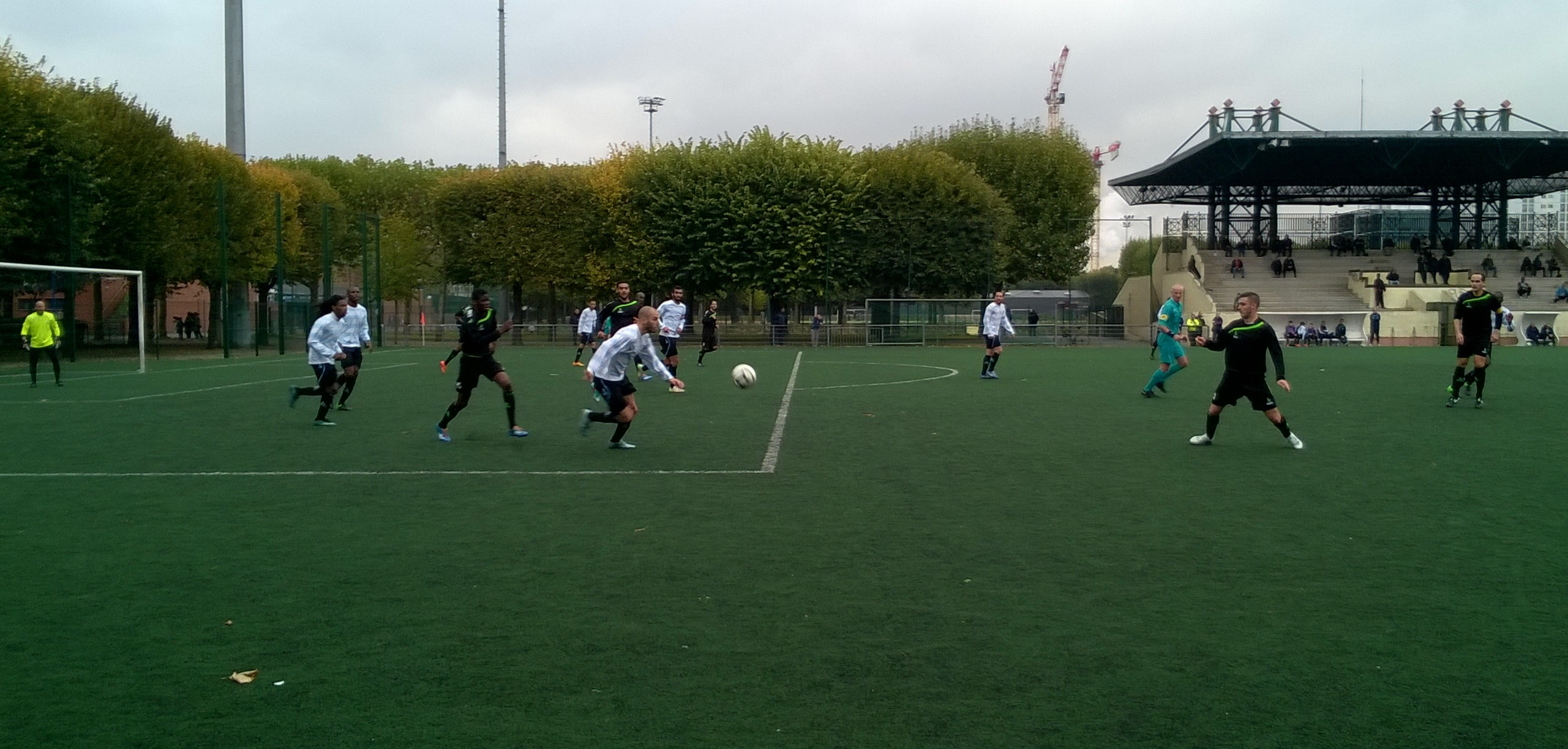 Scène de match entre le FC Gobelins (Paris 13) et le Racing Club de France football, en DH de Paris IDF.